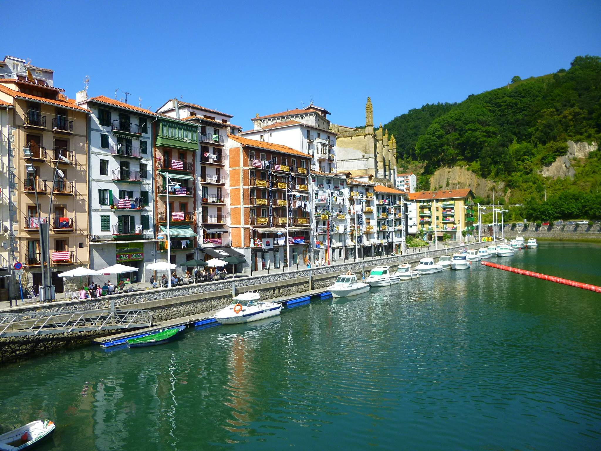 El río Artibai en su desembocadura en Ondarroa (Bizkaia)